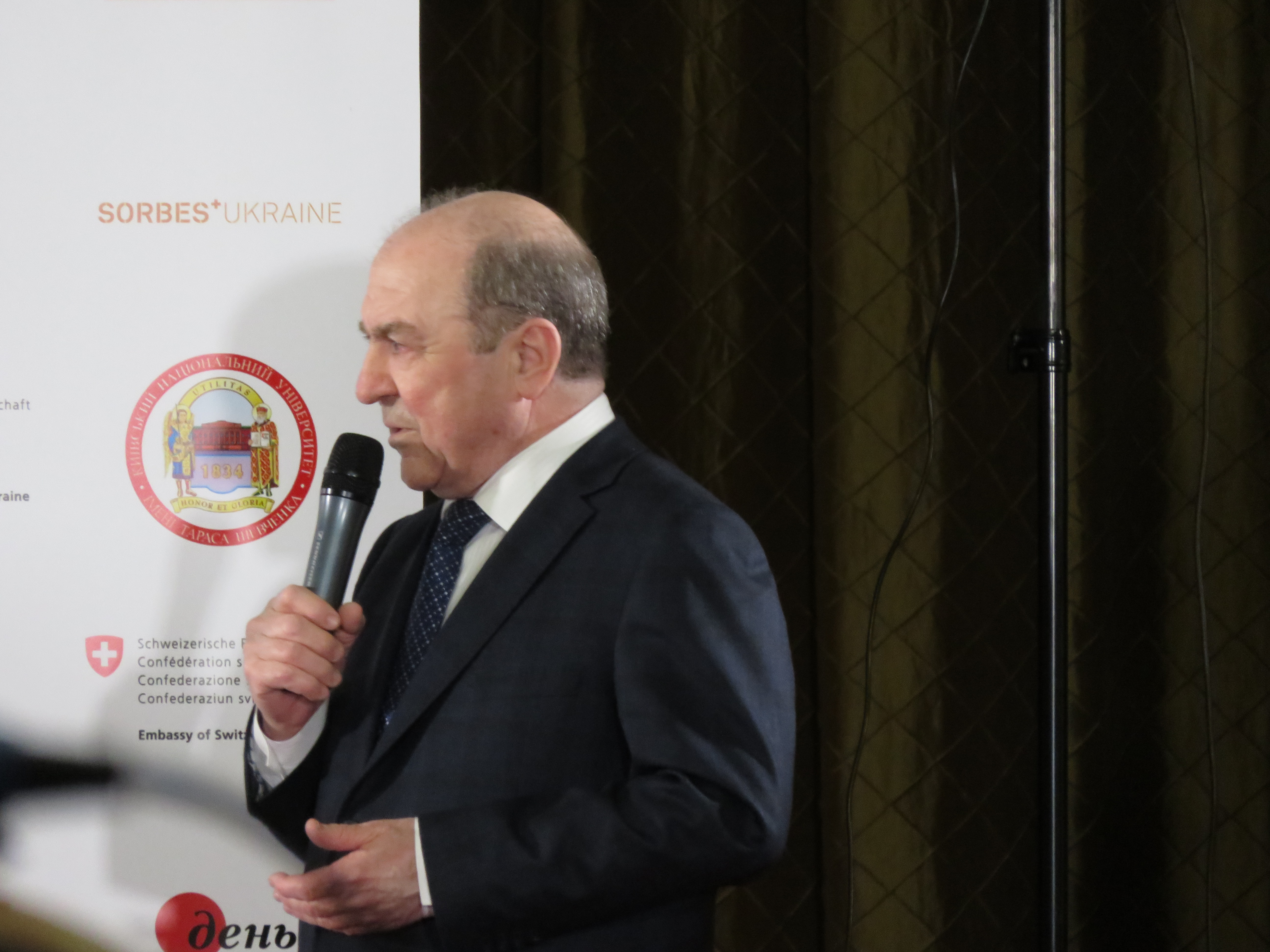 Леонід Губерський